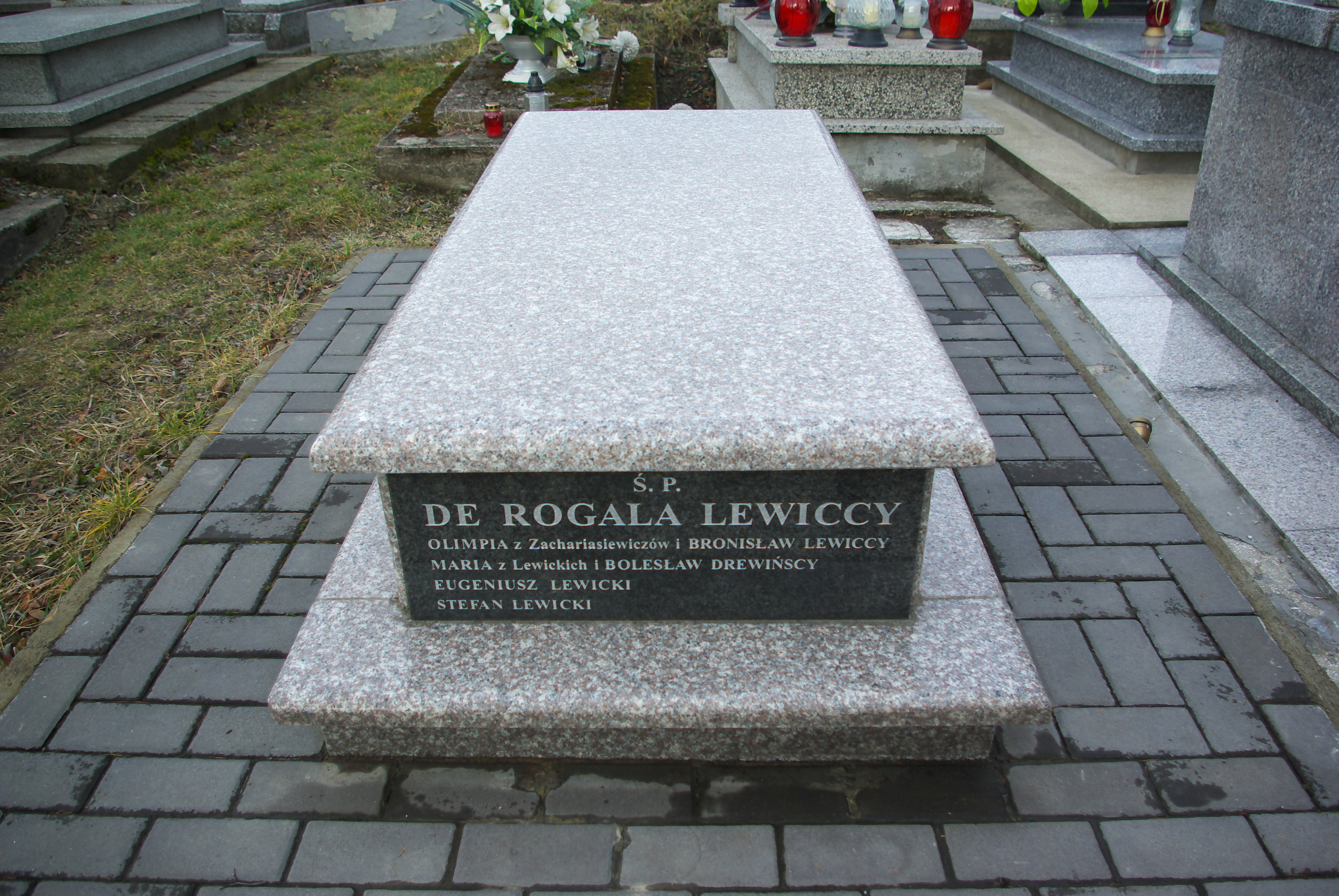 Nagrobek rodziny Lewickich na Cmentarzu Centralnym w Sanoku.